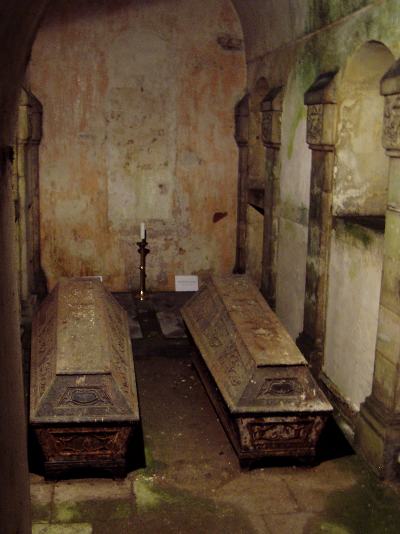 Pohled do boční místnosti rohanské rodové hrobky u kostela Nejsvětější Trojice v Loukově (v pozadí za rakvemi umístěnými venku je hrob v zemi Kamila Rohana a jeho ženy Adléty z Löwensteinu)